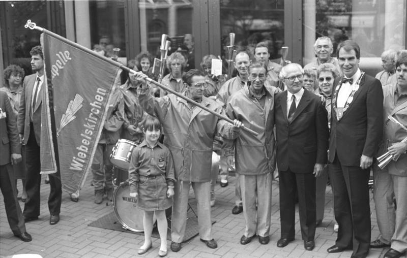 This description has been identified as biased or incorrect: 'Neuenkirchen' in description is misspelled, photo was taken in Neunkirchen (Saar), vor dem Eingang zum BürgerhausADN-ZB/Oberst 10.9.1987 BRD: Honecker-Besuch Der Generalsekretär des ZK der SED und Vorsitzende des Staatsrates der DDR, Erich Honecker, stellte sich in Neunkirchen zusammen mit dem Oberbürgermeister Peter Neuber (r) und dem Leiter der Schalmeienkapelle aus Wiebelskirchen, Werner Zins (3.v.r.) sowie mit dem jüngsten Nachwuchs der Kapelle zu einem Foto für die vielen Fotografen und Kameraleute.